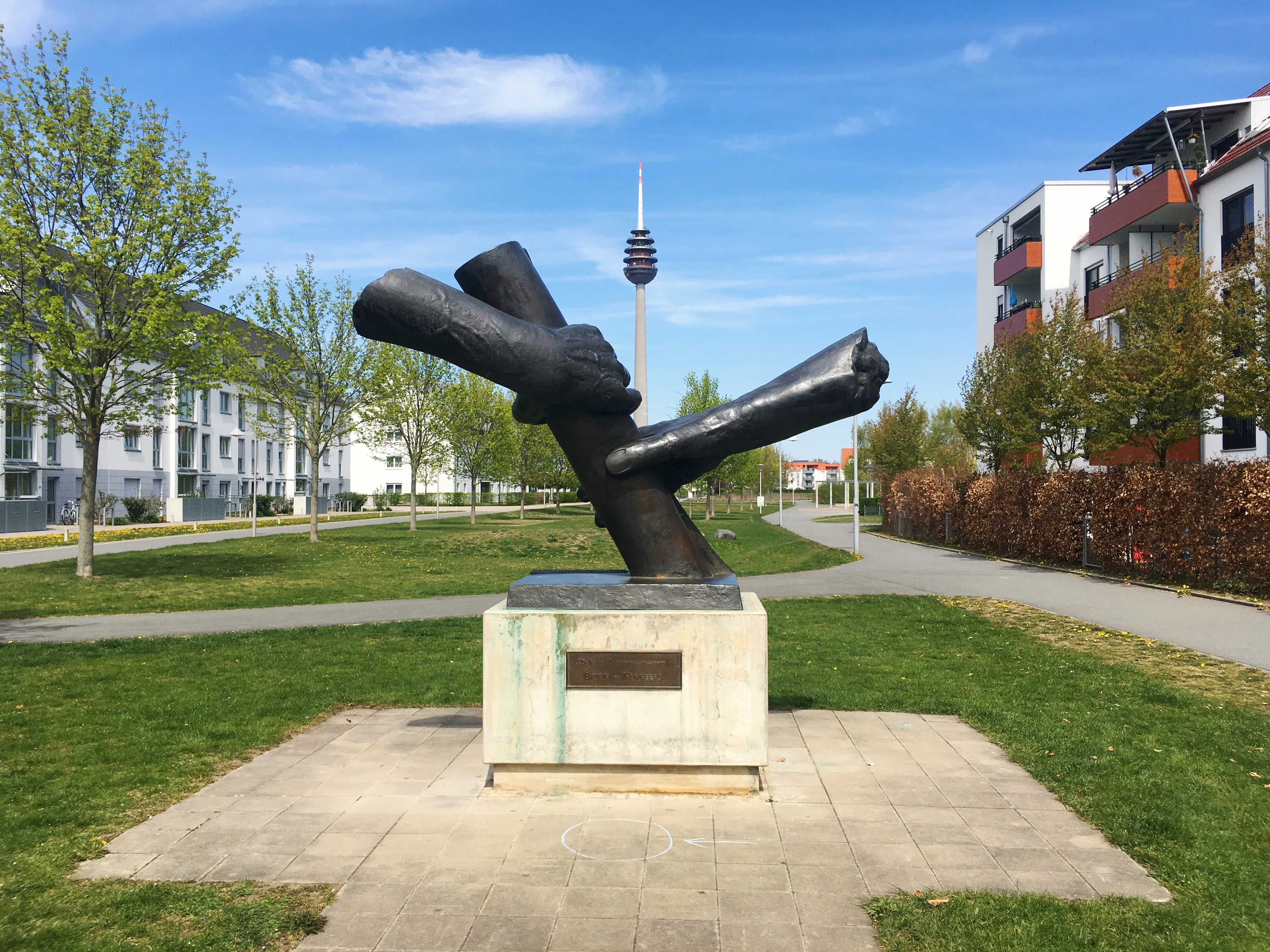 Denkmal anlässlich der 25-jährigen Städtepartnerschaft zwischen Skopje und Nürnberg